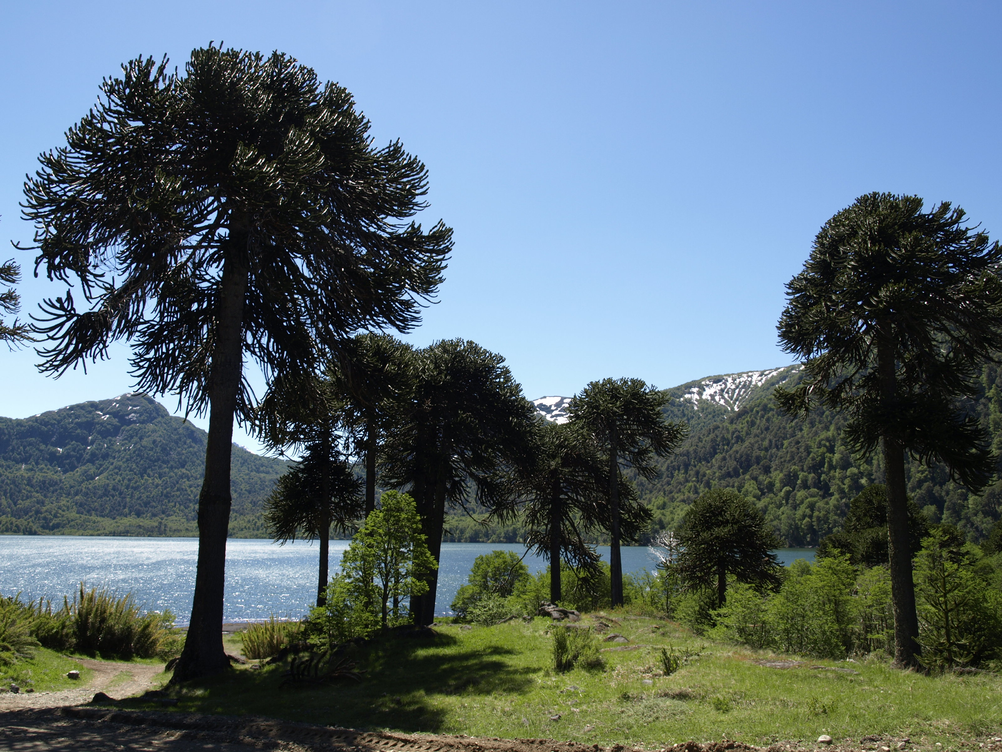 Parque Nacional Villarica, Chile.